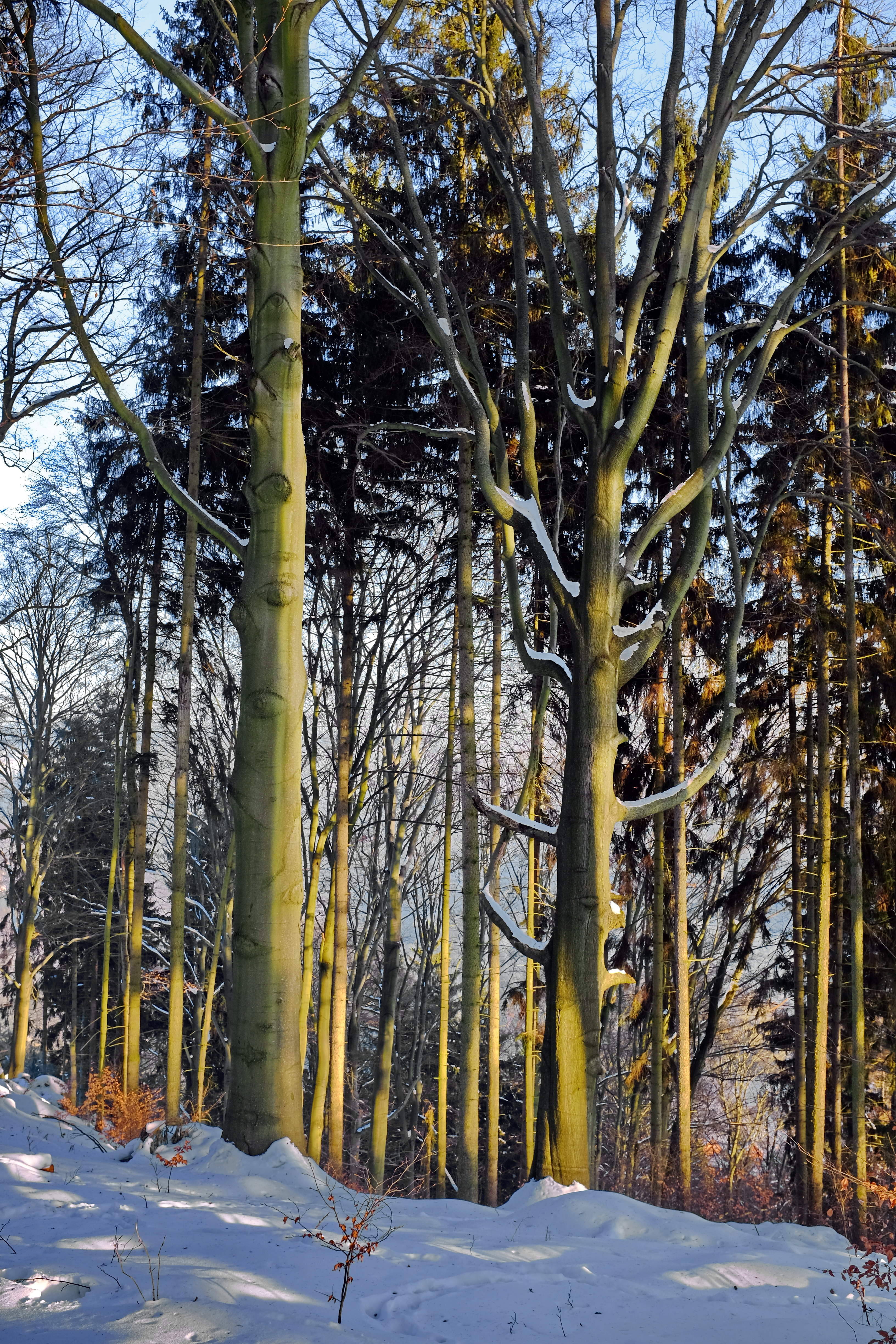 Památné stromy - Buky hraběte Chotka - lázeňské lesy v Karlových Varech